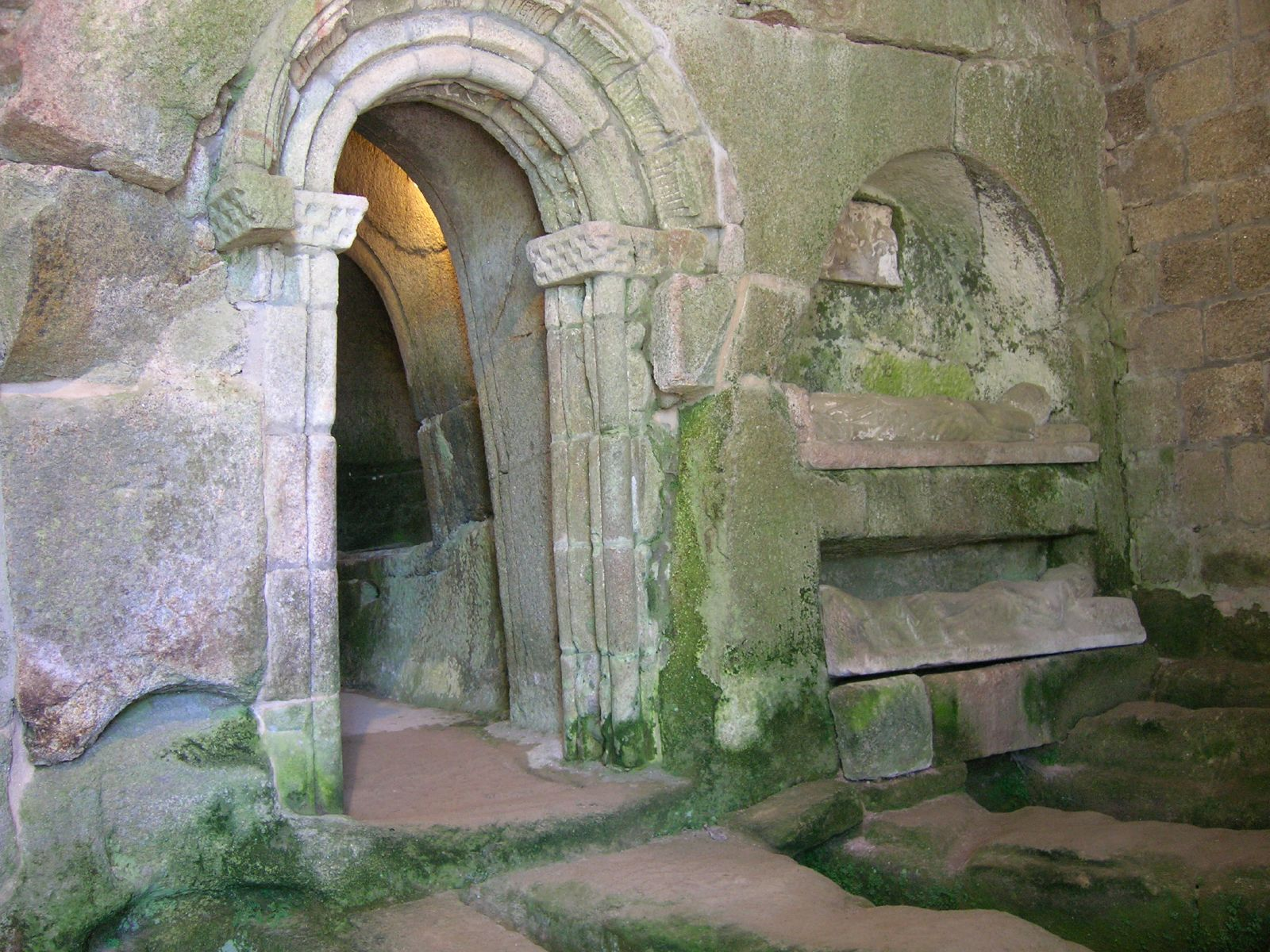 Mosteiro de San Pedro de Rocas, Esgos, Galiza. Parte da fachada da antiga igrexa rupestre co arco románico de entrada á capela da Epístola, e o nicho cos sepulcros de dous cabaleiros xacentes.